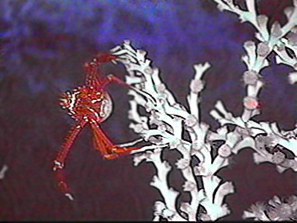 Lophelia fauna